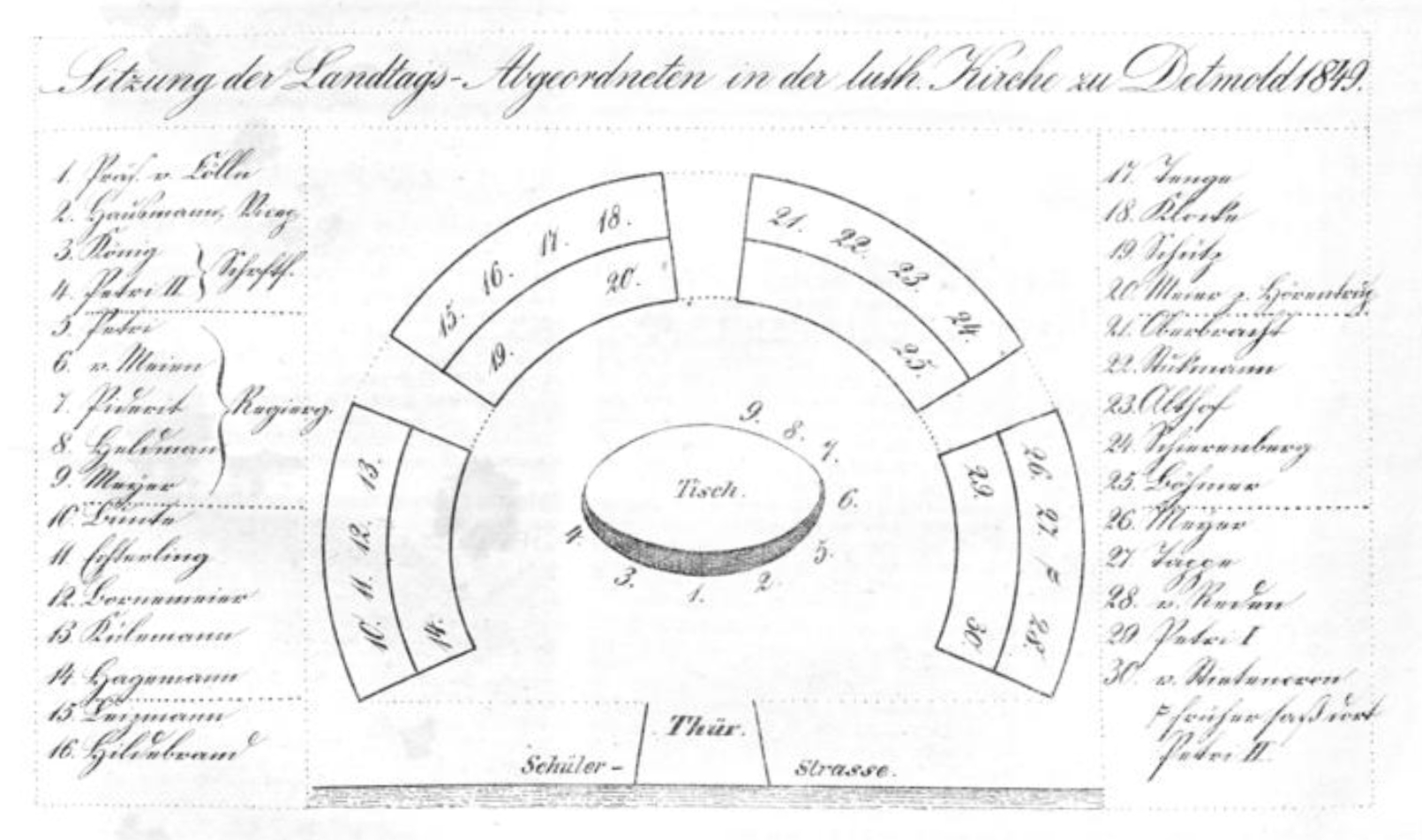 Sitzordnung der Abgeordneten des Lippischen Landtags (Volkskammer) bei der Konstituierenden Sitzung am 11. Juni 1849